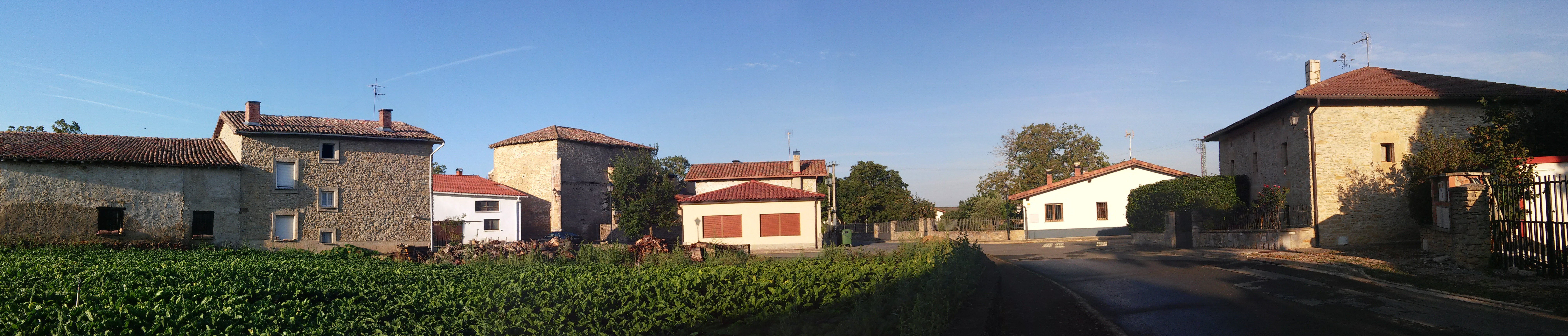 Andollu herria (Gasteiz)